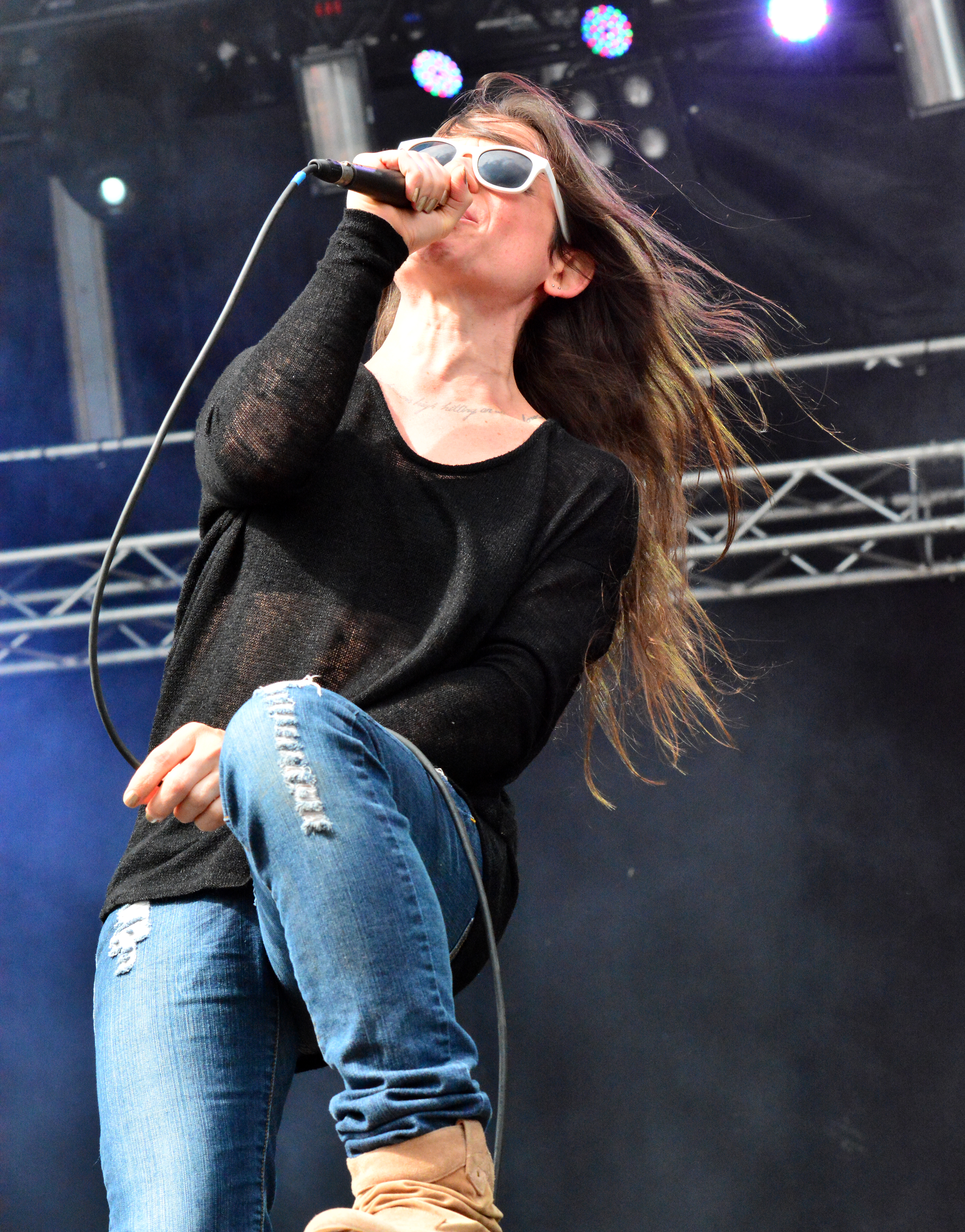 Mina Caputo früher auch Keith Caputo von Life of Agony beim Elbriot 2014